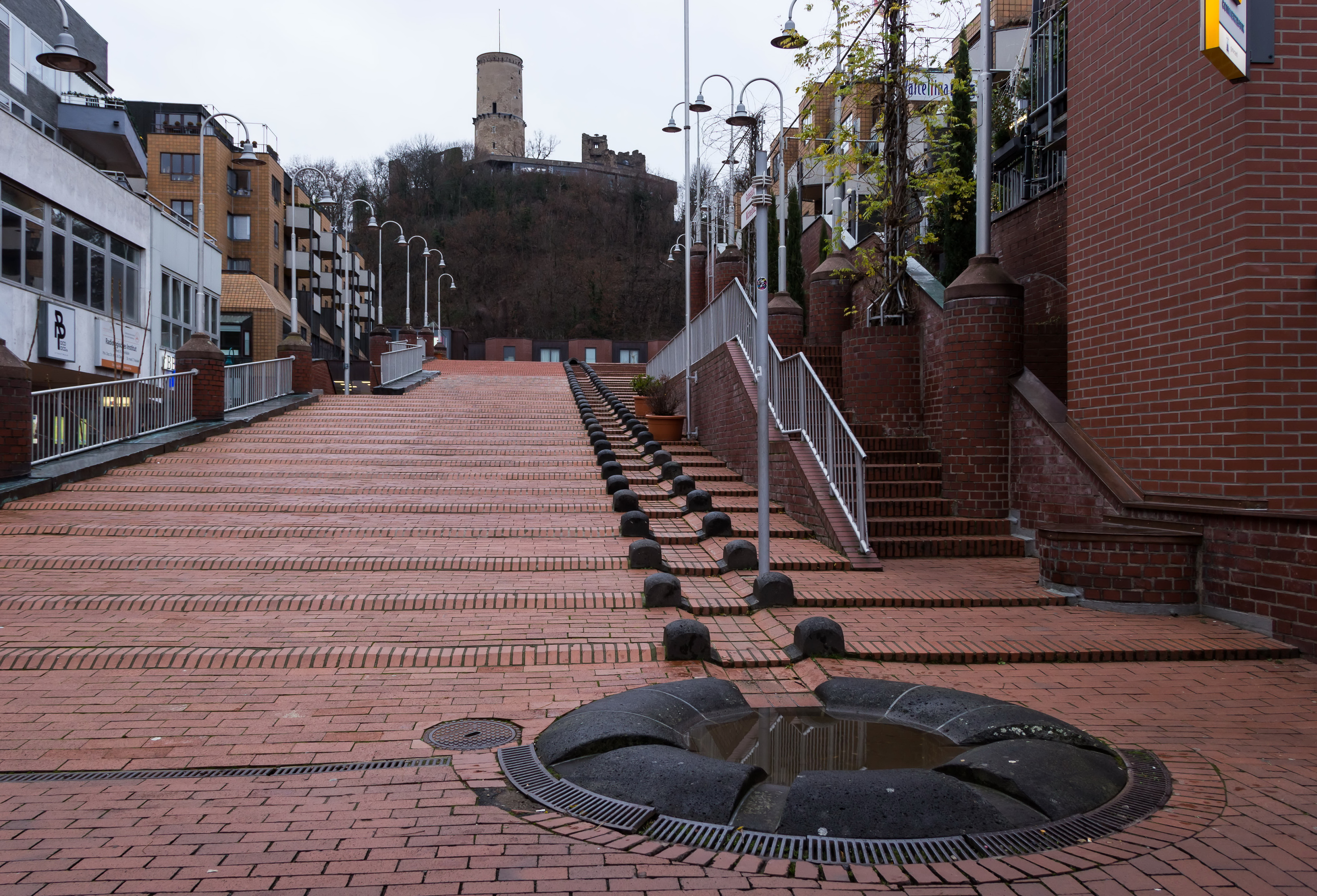 Treppenbrunnen; Der Brunnen, nach einem Entwurf von Gottfried Böhm, wurde 1980 am Aufgang zum damaligen Altstadtcenter eingeweiht. Seine Form erinnert an einen künstlichen Bach, er ist circa fünf Meter lang und besteht aus Basaltlava und Backstein.